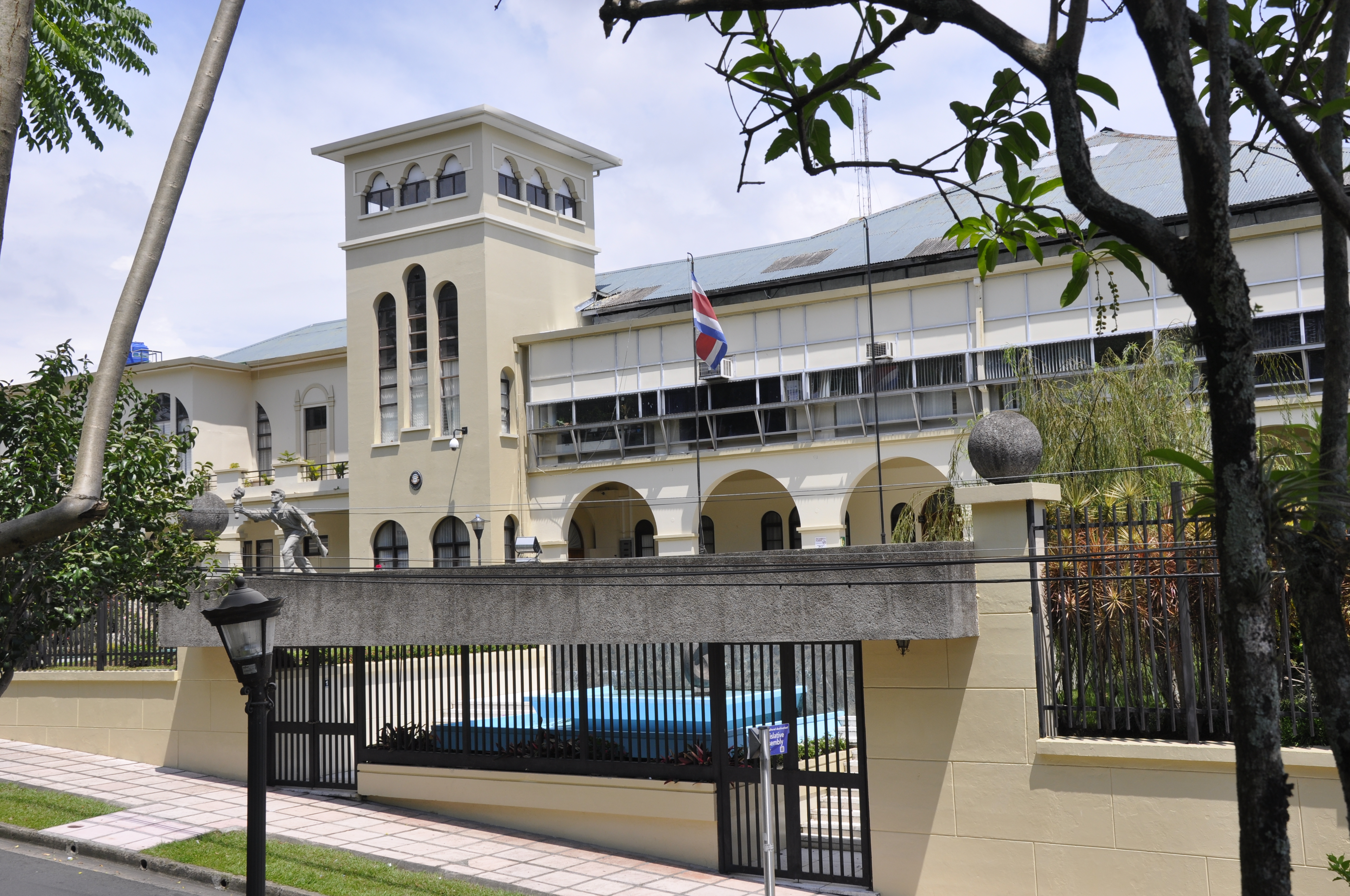 Asamblea Legislativa, San José, Costa Rica